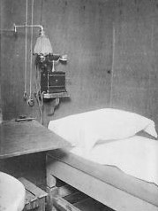 una cabina di riposo della Casa del Passeggero, foto d'epoca